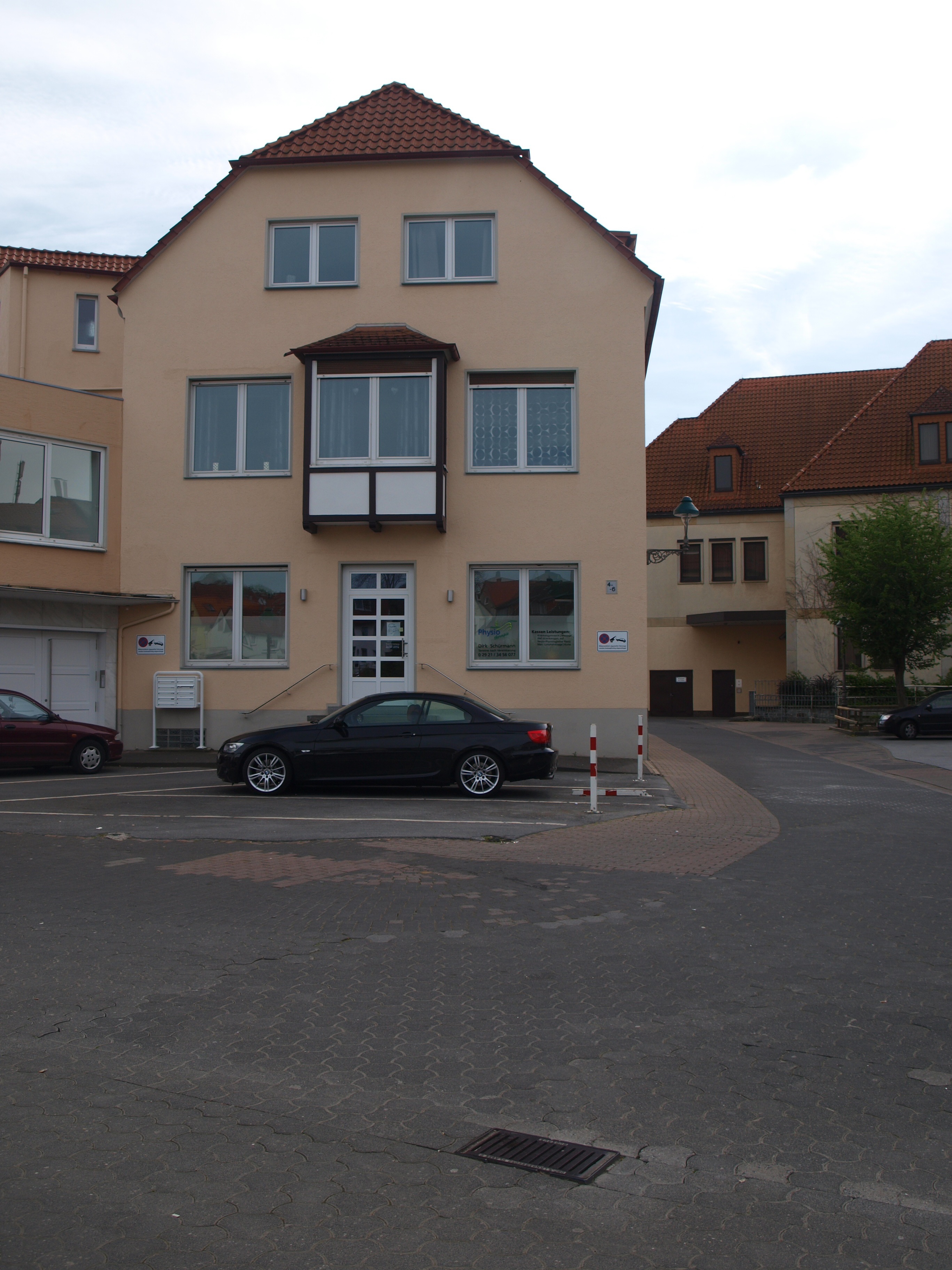 Stolpersteinlage Soest Waisenhausstr 4